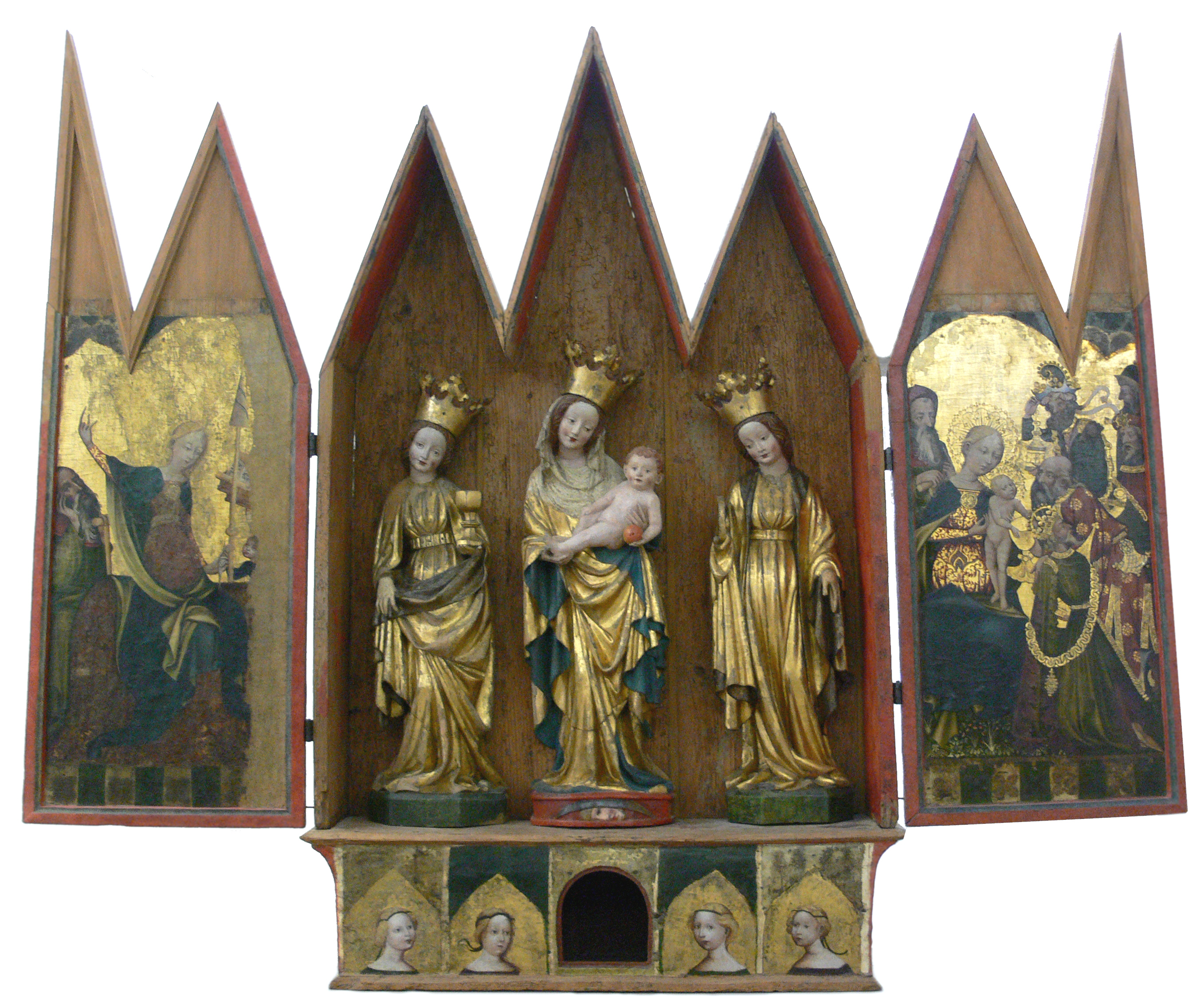 Flügelaltar aus Dornstadt, Skulpturen von Meister Hartmann, datiert 1417 Figur Muttergottes Figur Hl. Katharina Figur Hl. Barbara Flügel: Josefszweifel Flügel: Anbetung der Könige Predella: Vier weibliche Heilige (evtl. Abbildungen von Kopfreliquaren der 11.000 Jungfrauen von St. Ursula) Württembergisches Landesmuseum Stuttgart